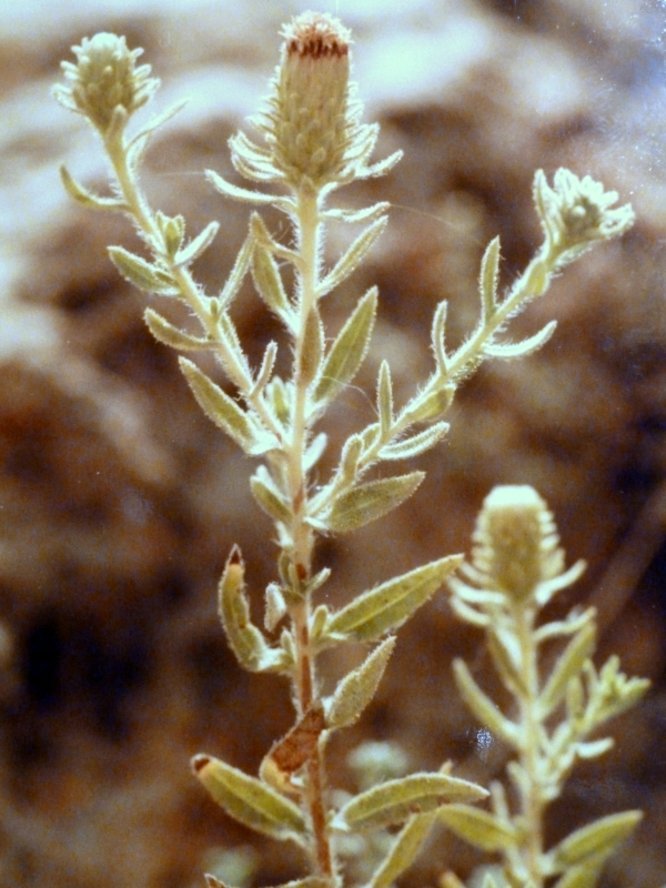 Jasonia glutinosa (=Chiliadenus glutinosus) [Té de roca] - Monte del Clementino/Cerro de Admajaleta, Albatera (Alicante, España)